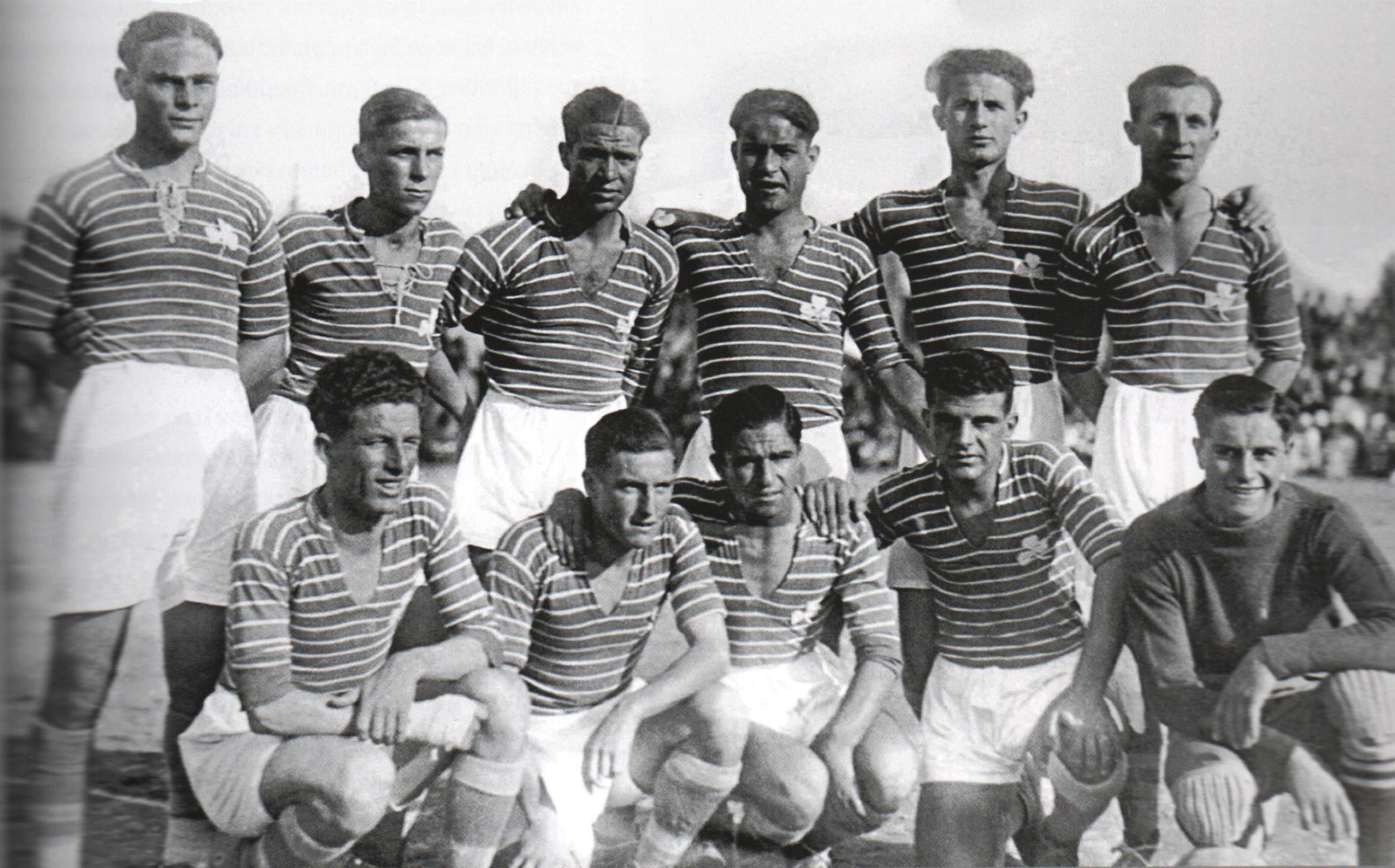 Η ποδοσφαιρική ομάδα του Παναθηναίκού το 1930